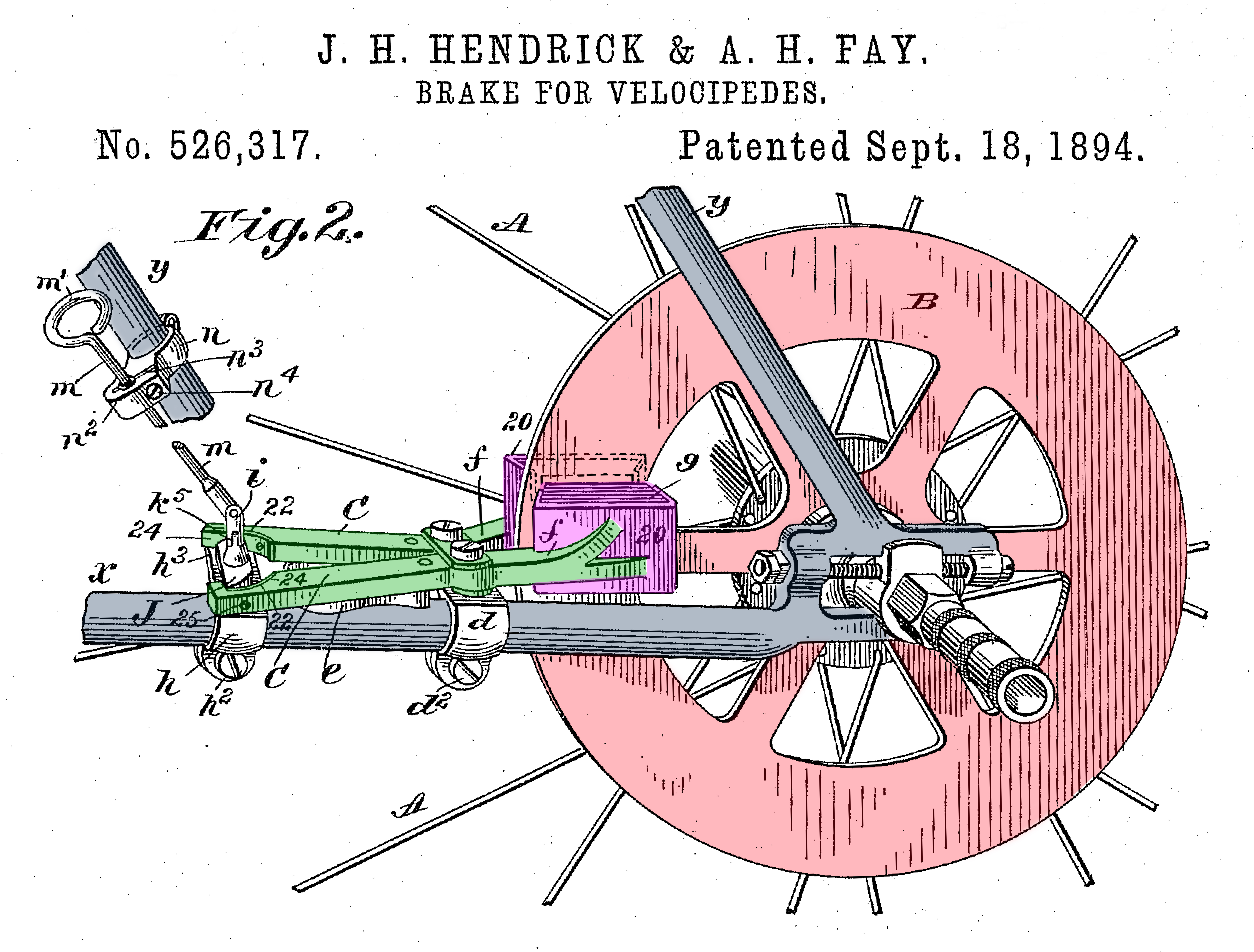 Patent einer Scheibenbremse für Fahrräder - Patent Nr. US526317